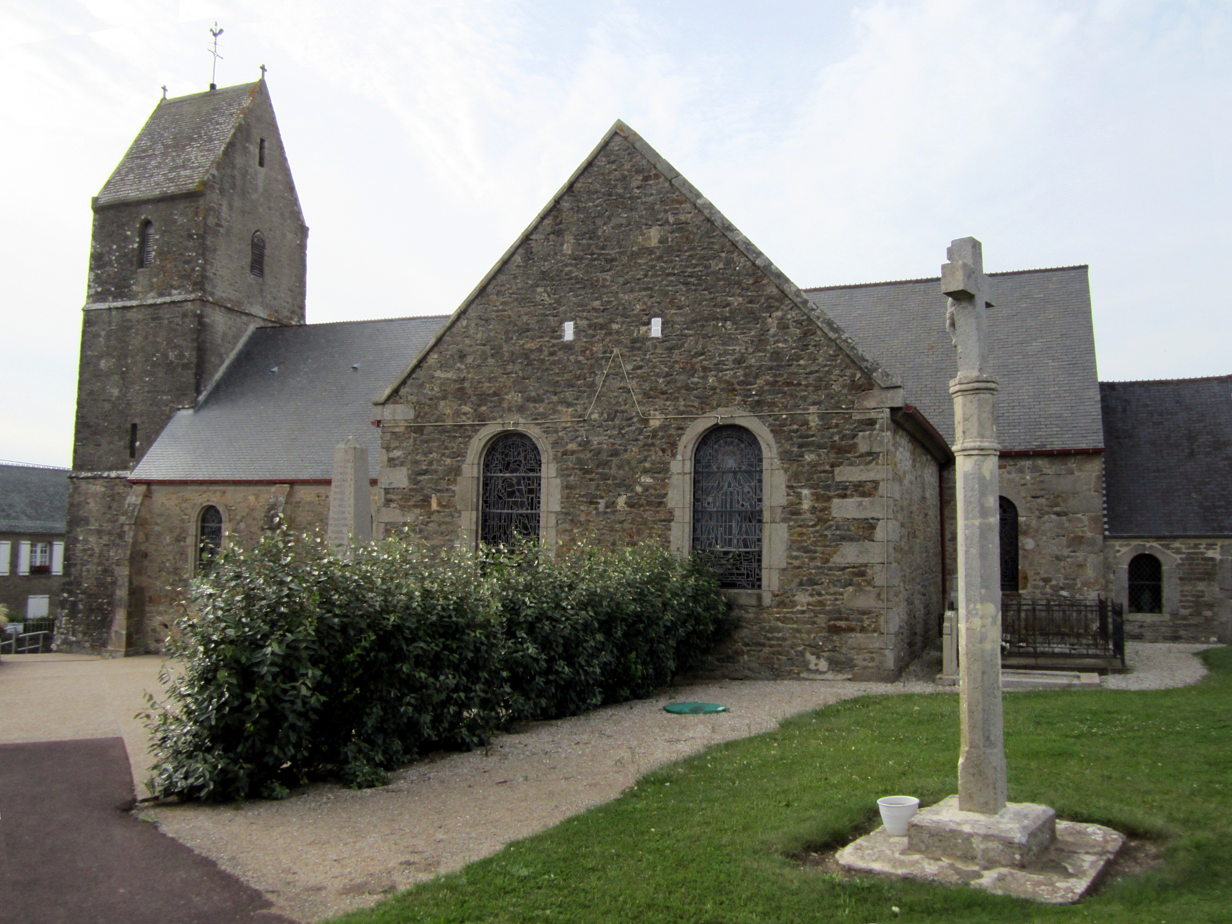 Église Saint-Pierre de Surtainville